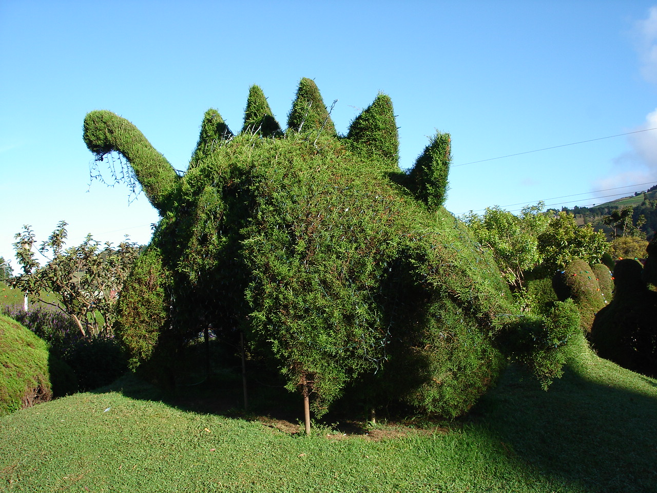 Dinosaurio en el Paque de Zarcero